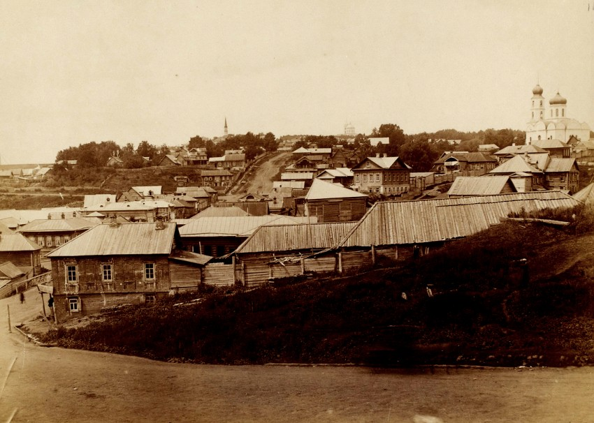 Уфа. Церковь Илии Пророка